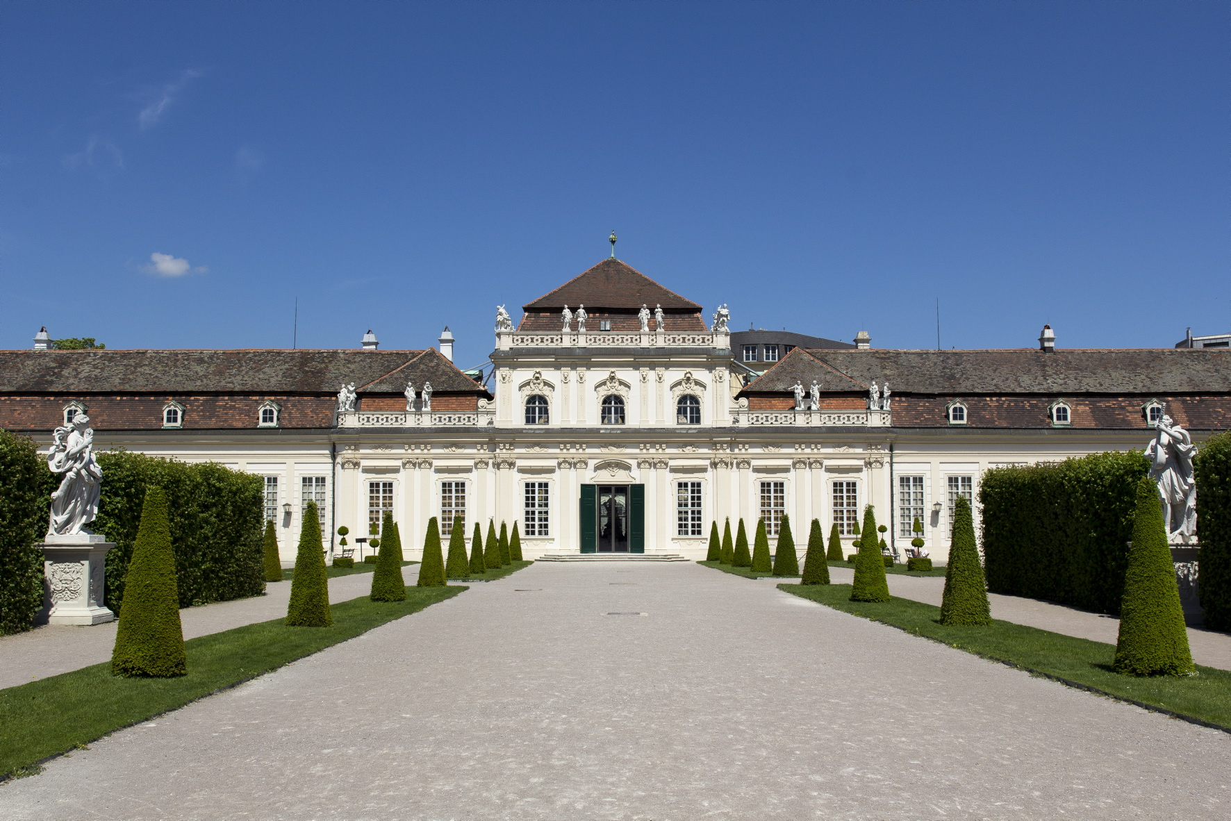 Südliche Ansicht des Unteren Belvederes mit Gartenweg